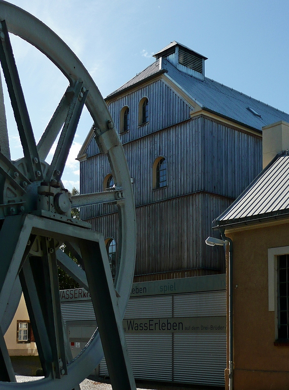 Blick auf das Treibehaus des Drei-Brüder-Schachtes in Zug bei Freiberg. Der zwischen 1791 und 1818 geteufte Schacht wurde ursprünglich unter anderem als Teil eines Entwässerungsprojektes errichtet, entwickelte sich aber später zum Hauptschacht der Grube "Segen Gottes Herzog August". Nach der Einstellung des Bergbaus entstand 1914 im Drei-Brüder-Schacht eines der ersten Kavernenkraftwerke der Welt.